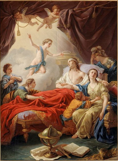 Le Dauphin mourant entouré de sa famille, le duc de Bourgogne lui présente le couronne de l'immortalité, le 20 décembre 1765